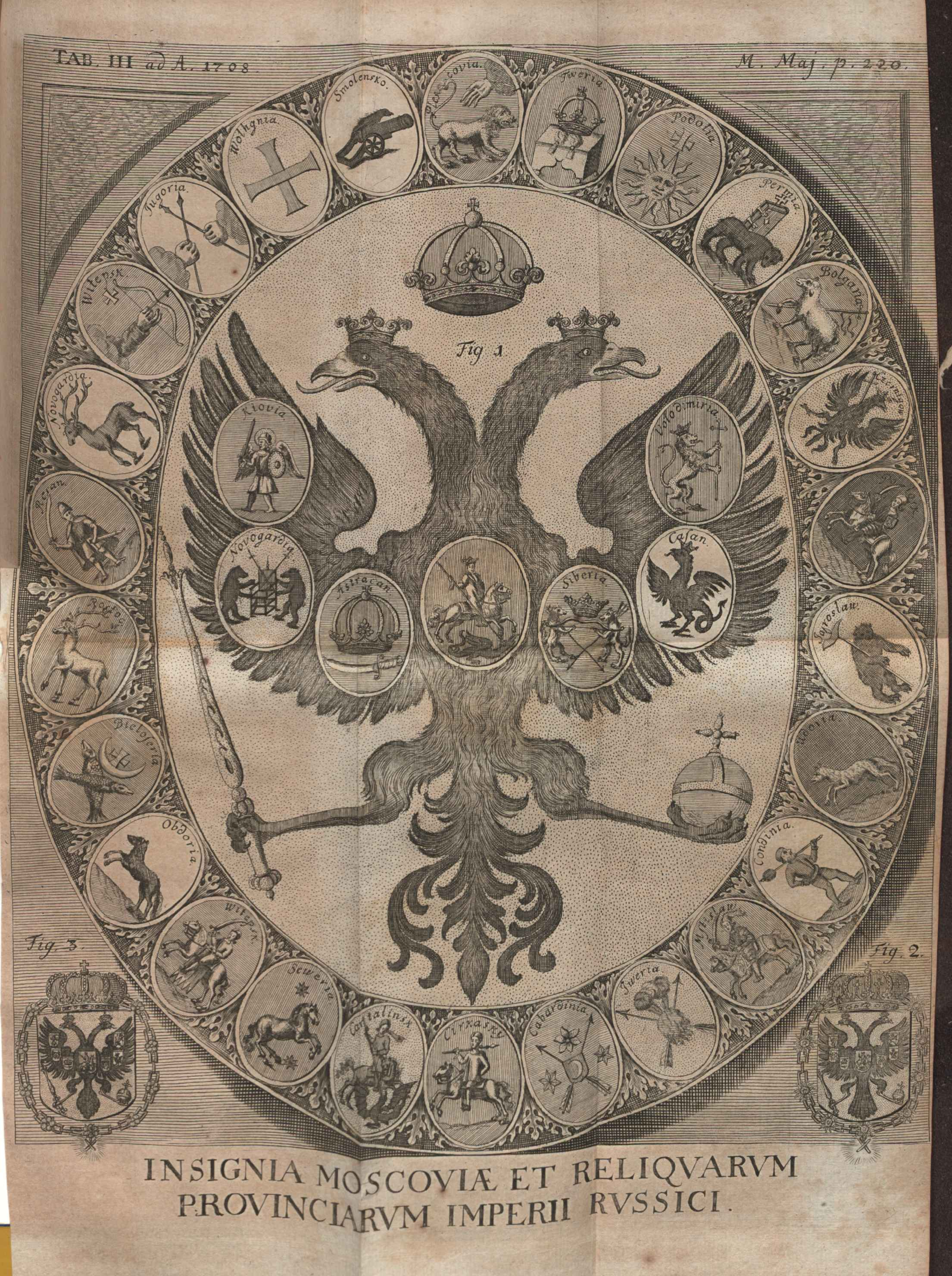 Illustration